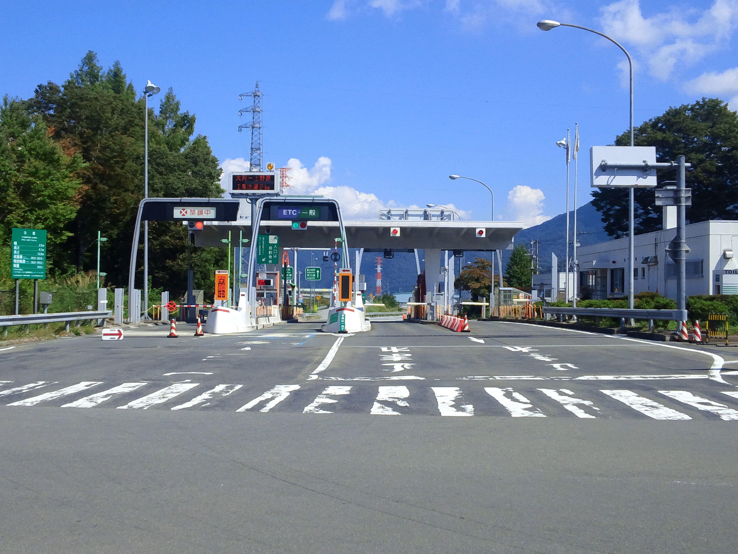 中央自動車道富士吉田線都留インターチェンジ料金所付近（一般道から撮影）